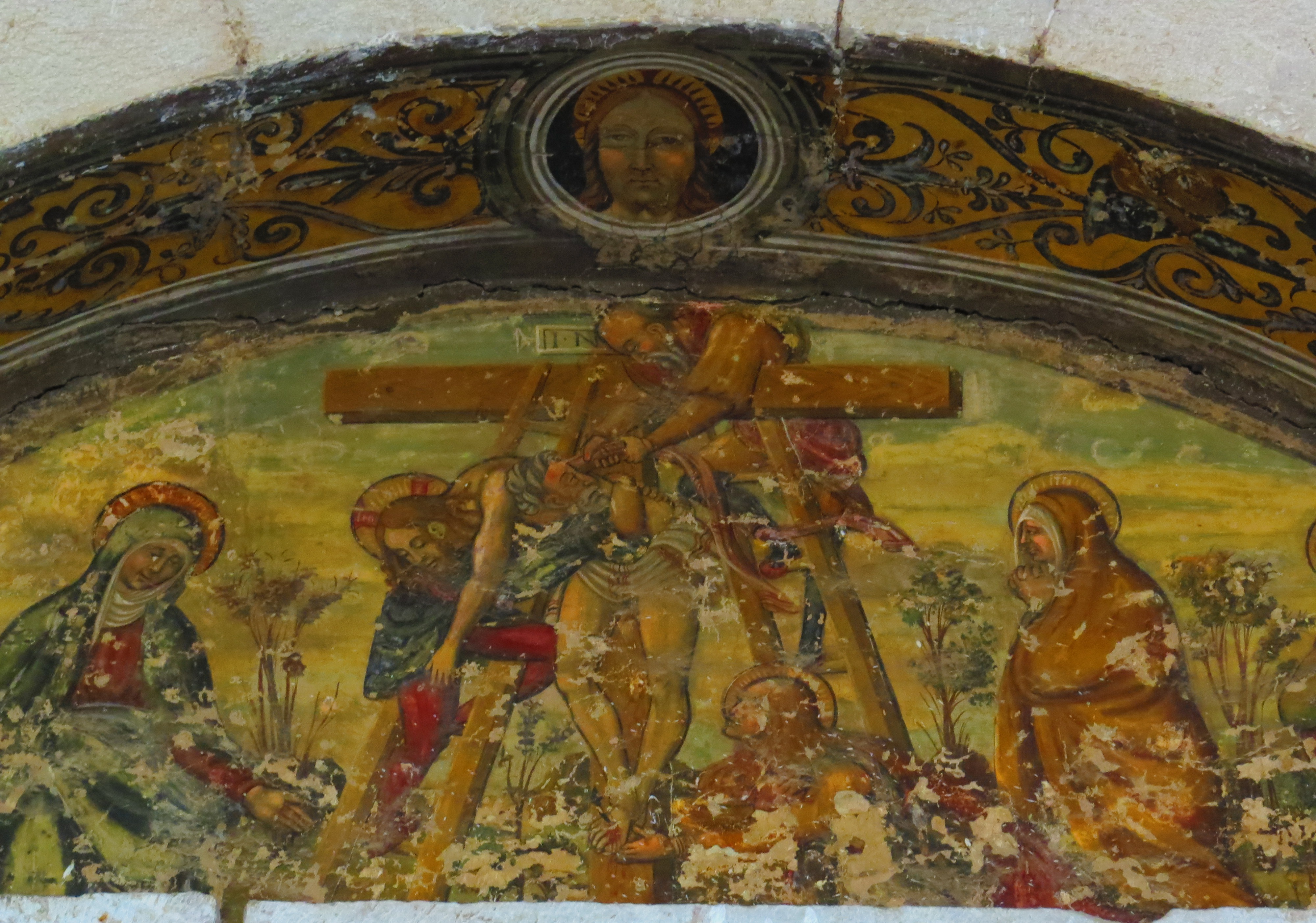 La chiesa della Madonna delle Grazie, annessa a un convento francescano nel centro storico di Montesarchio (BN)